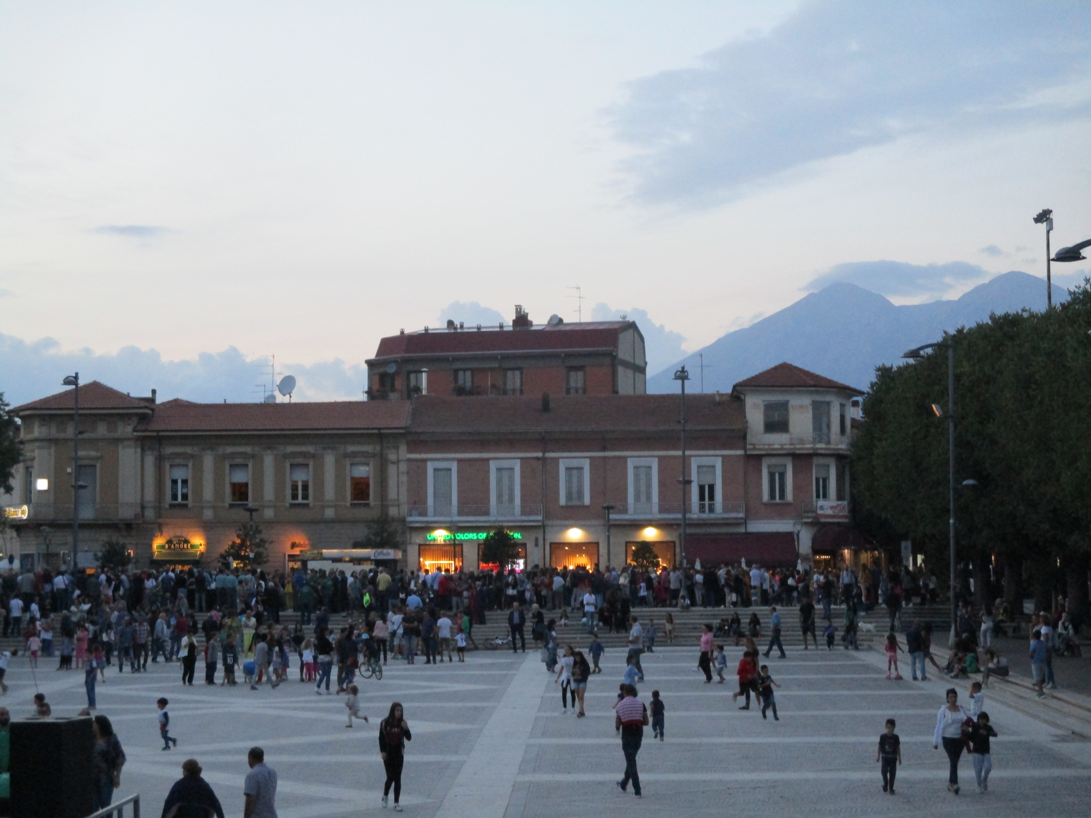 Il prospetto nord